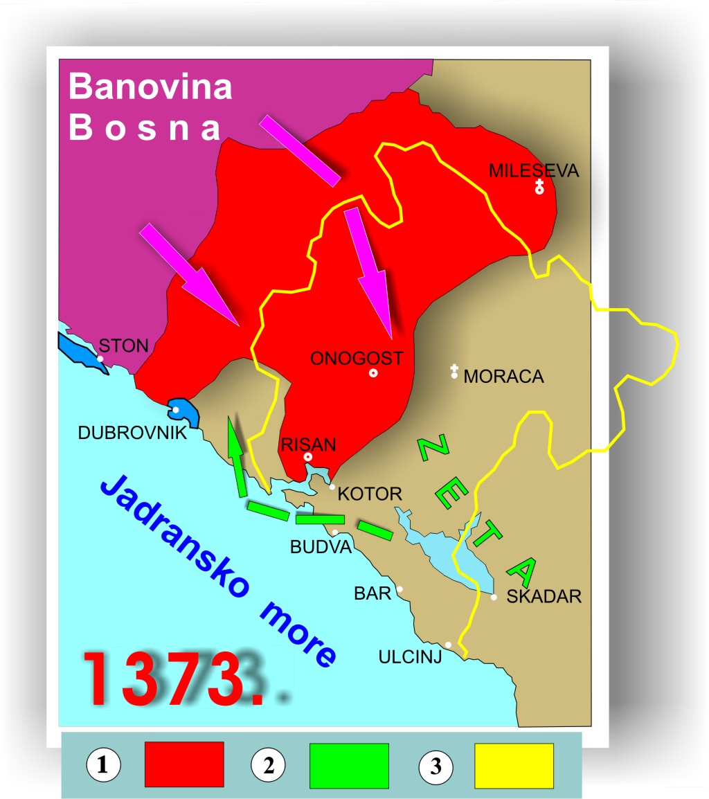 Srpski župan Nikola Altomanović (Vojinović) izgubio je svoje teritorije u sukobu sa koalicijom: srpski knez Lazar Hrebeljanović, bosanski ban Tvrtko I ugarski kralj Ludvig I (ban Gorjanski). 1. Šitenje Bosne na djelove posjeda Nikole Altomanovića, poslije njegovog poraza I osljepljivljanja u Užicu, 1373. godine; 2. Privremeno zauzimanje Drečevice, Konavla I Trebinja od strane Zete (Balšići); 3. Današnje granice Crne Gore.(Grupa autora: "Istorija Crne Gore", Titograd 1970. godine, knjiga II, tom 2.)